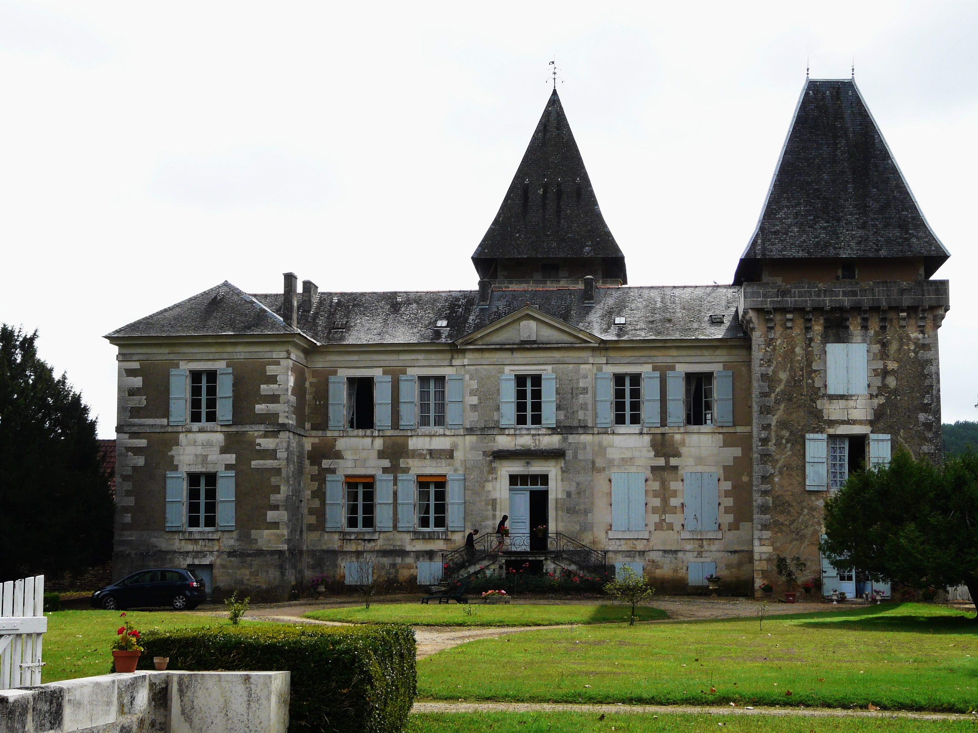 La façade ouest du château de Conty à Coulaures, Dordogne, France